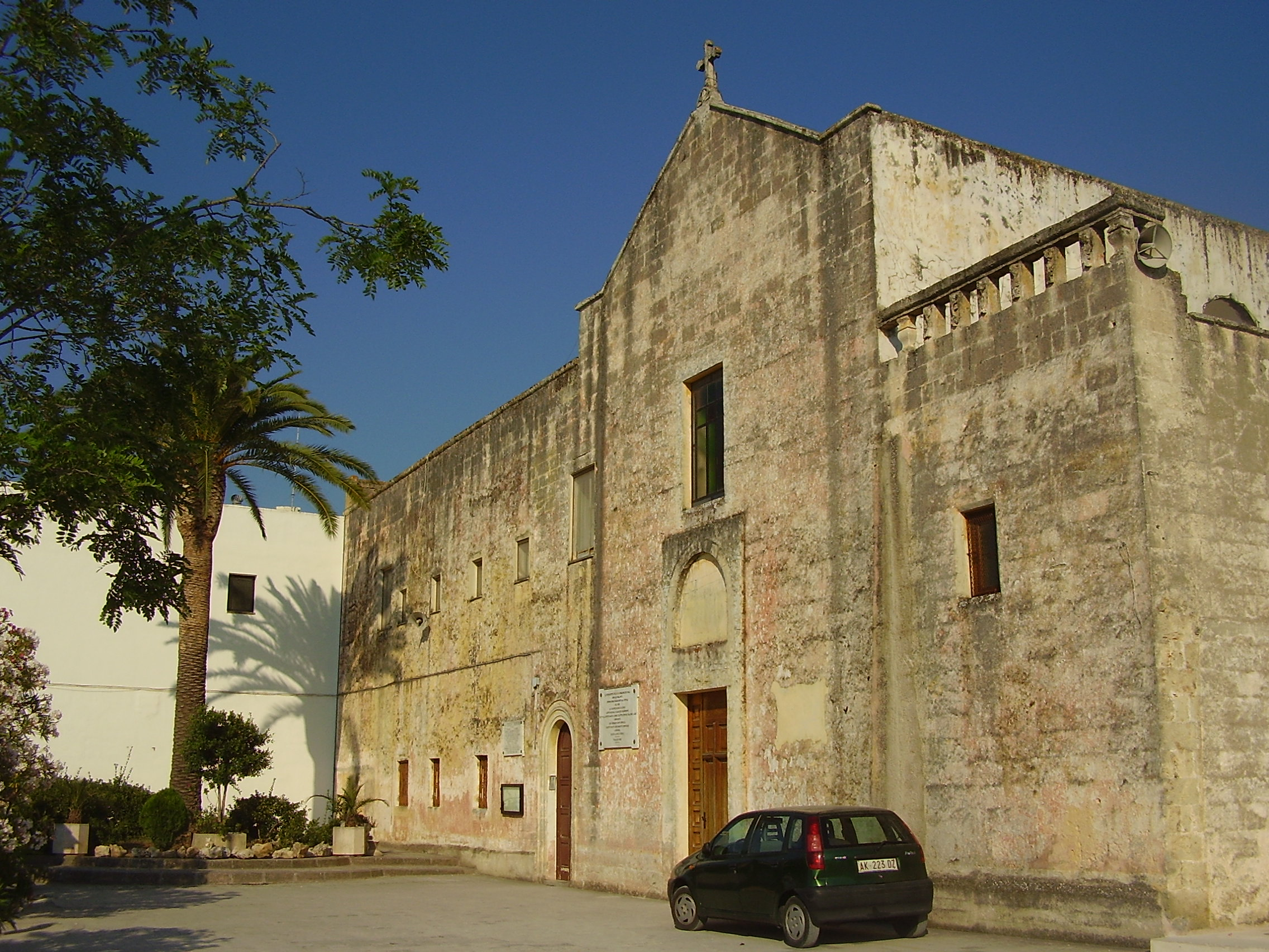 Chiesa San Francesco d'Assisi Ruffano